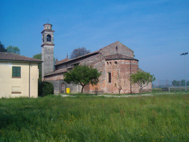 Brisckerly, opera sua, Palazzo Pignano (CR)